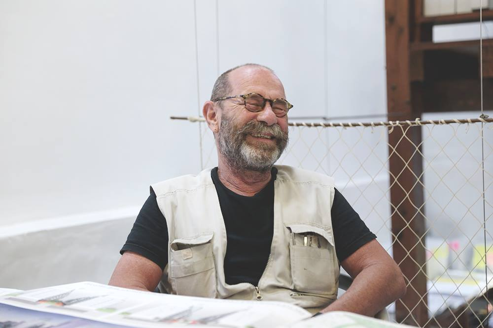 צילום: שרהלה גור לוי